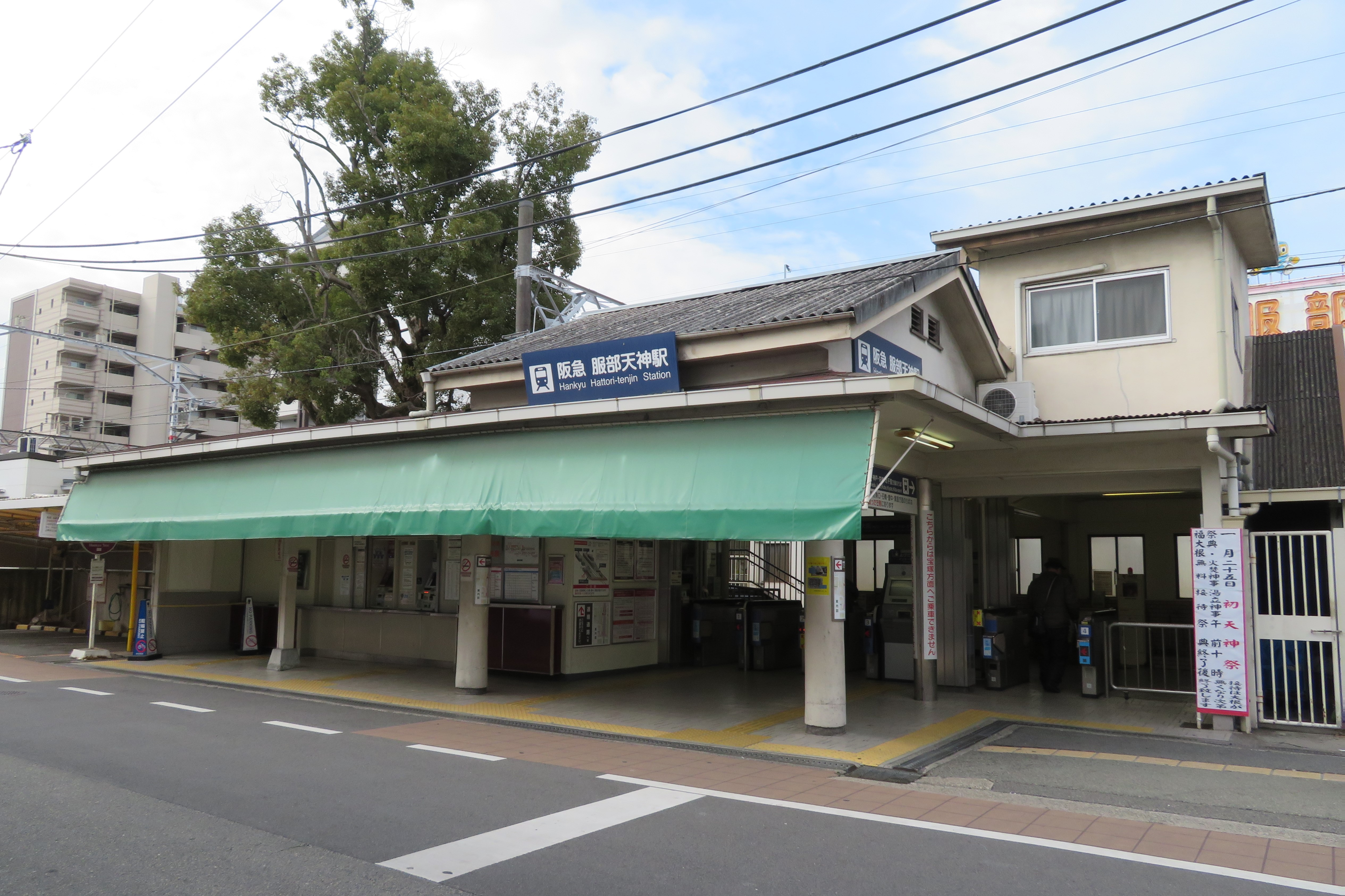 阪急服部天神駅東口